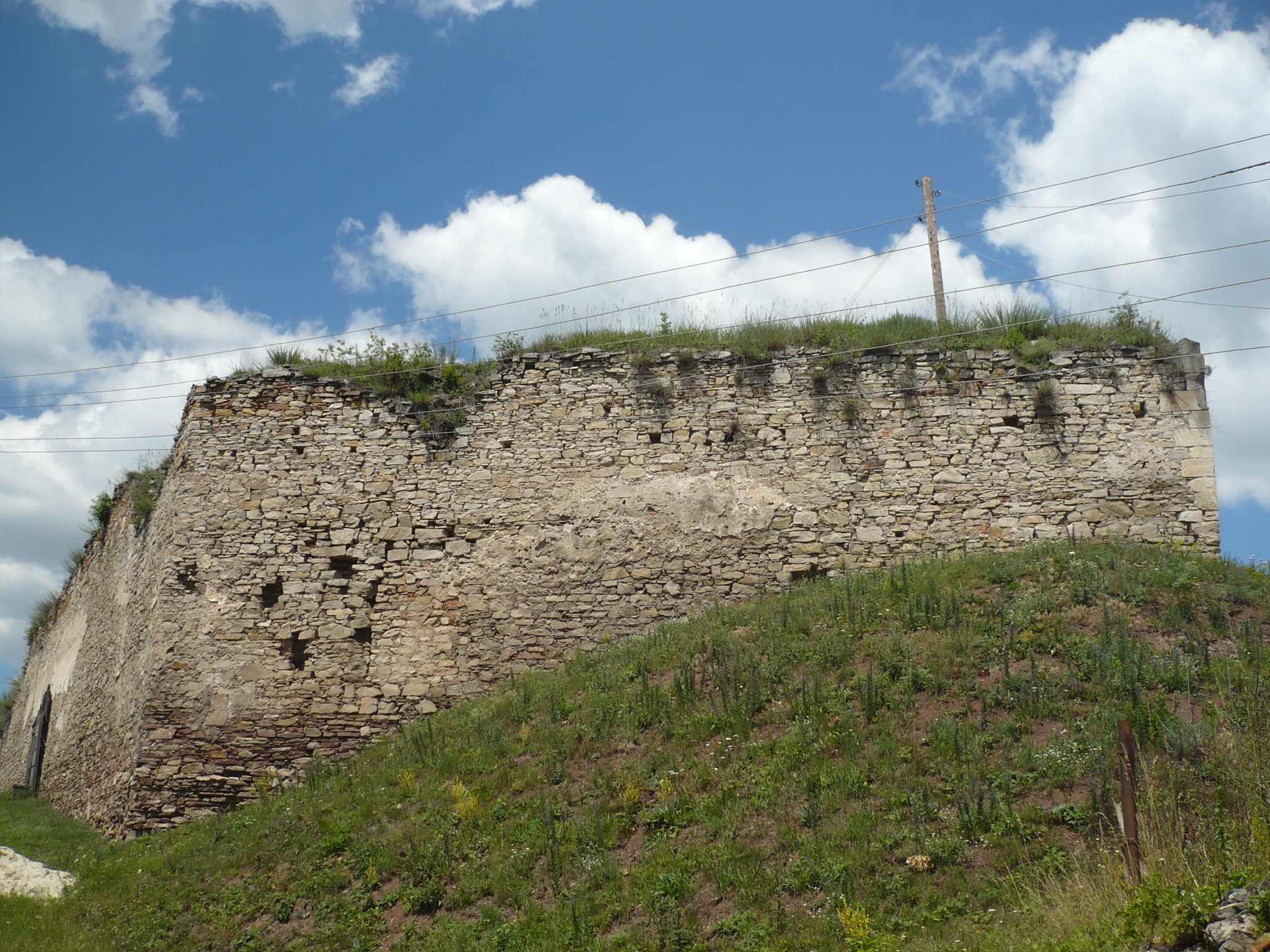 Jazłowiec. Zamek